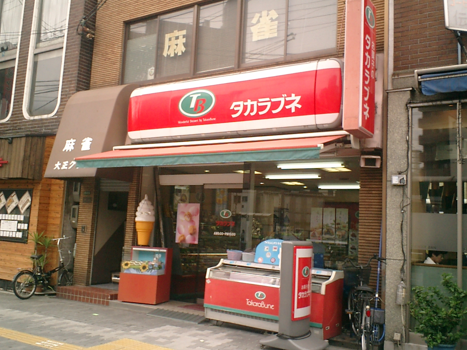 Takarabune Sweets at Taisho Osaka